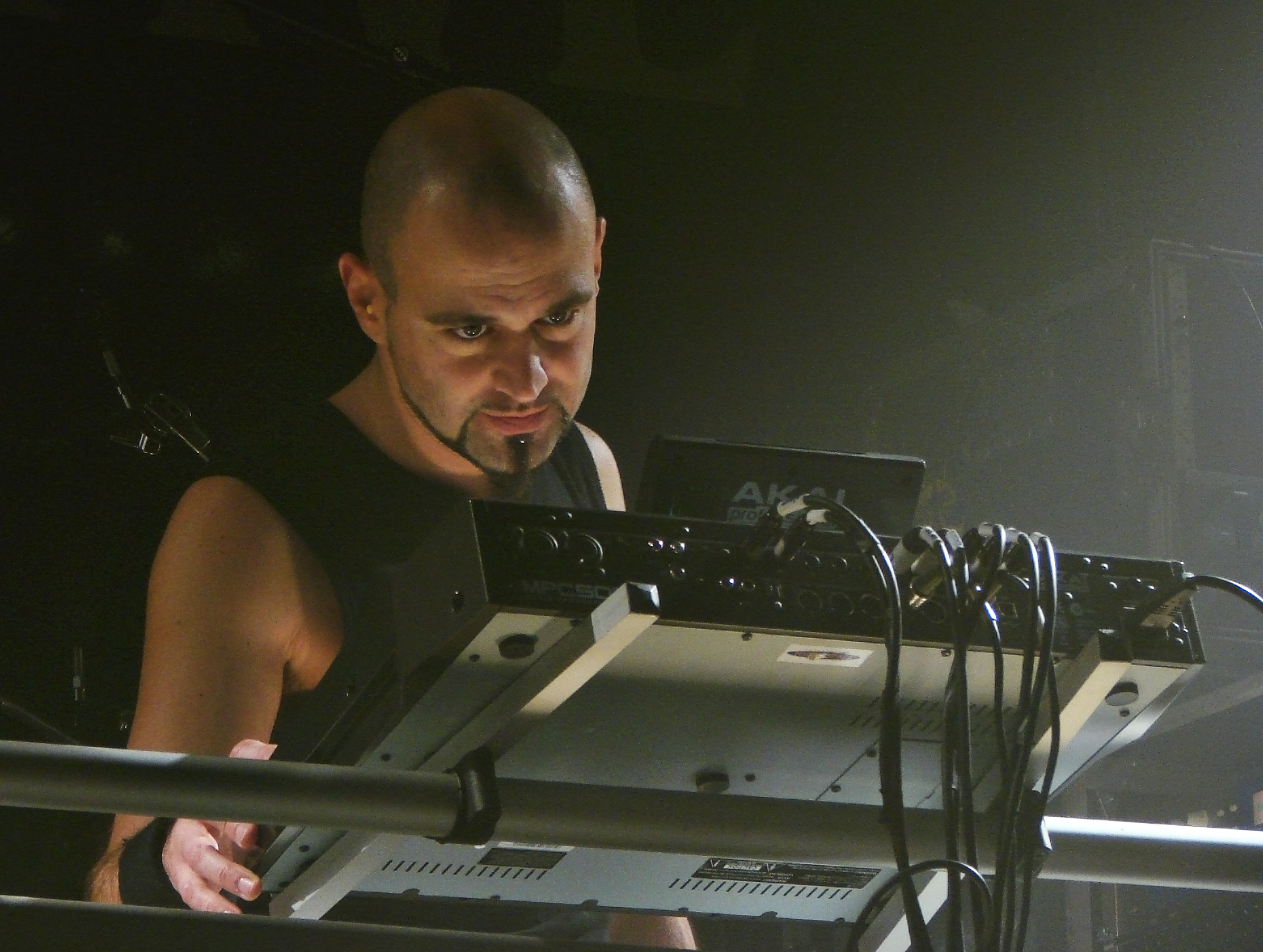 Samael en concert à la Locomotive, à Paris, le 11 Janvier 2009: Xy aux claviers et percussions.